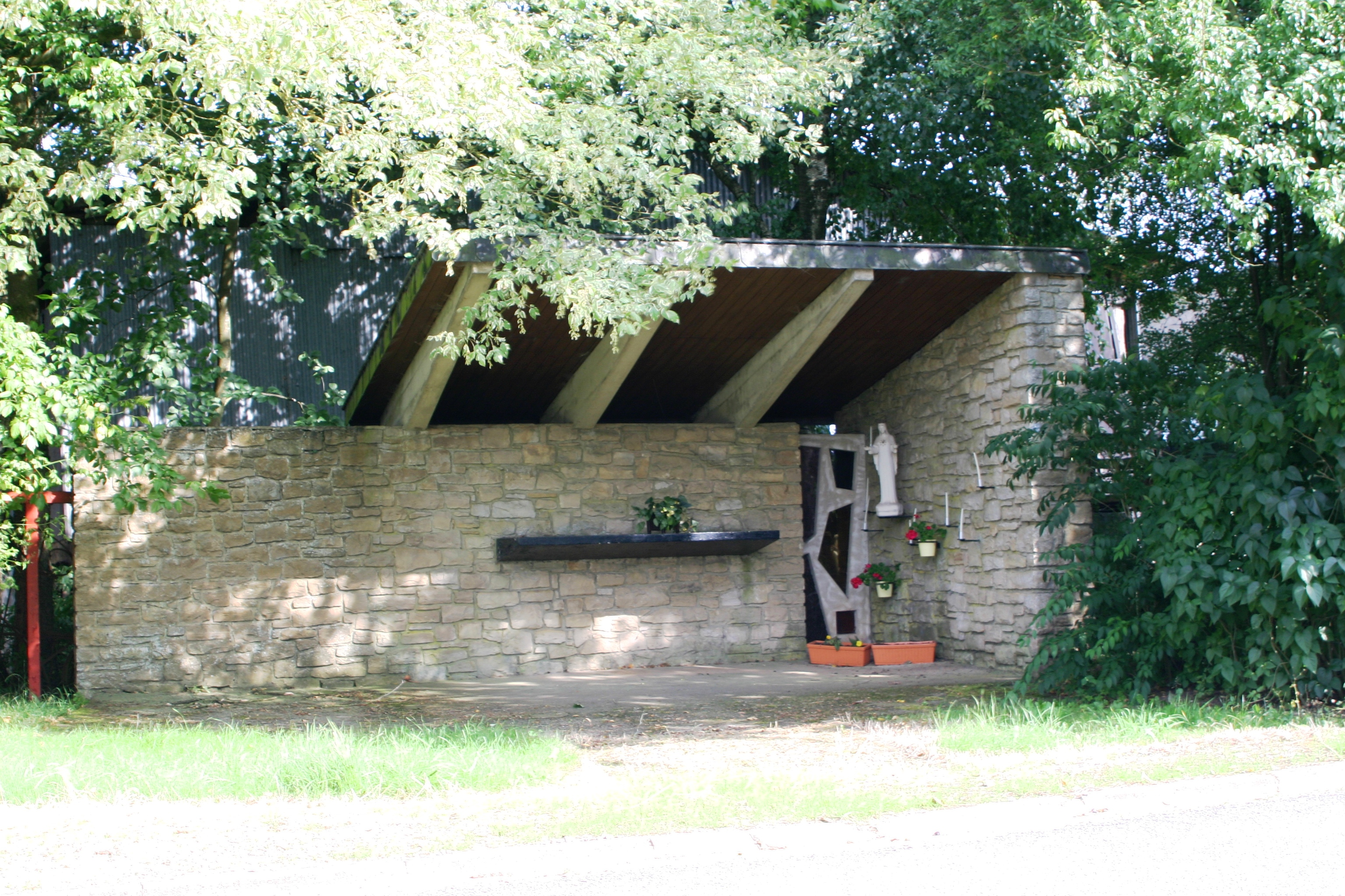 Eng modern Kapell zu Post (Belsch)